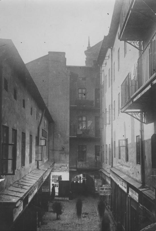 Цукерні